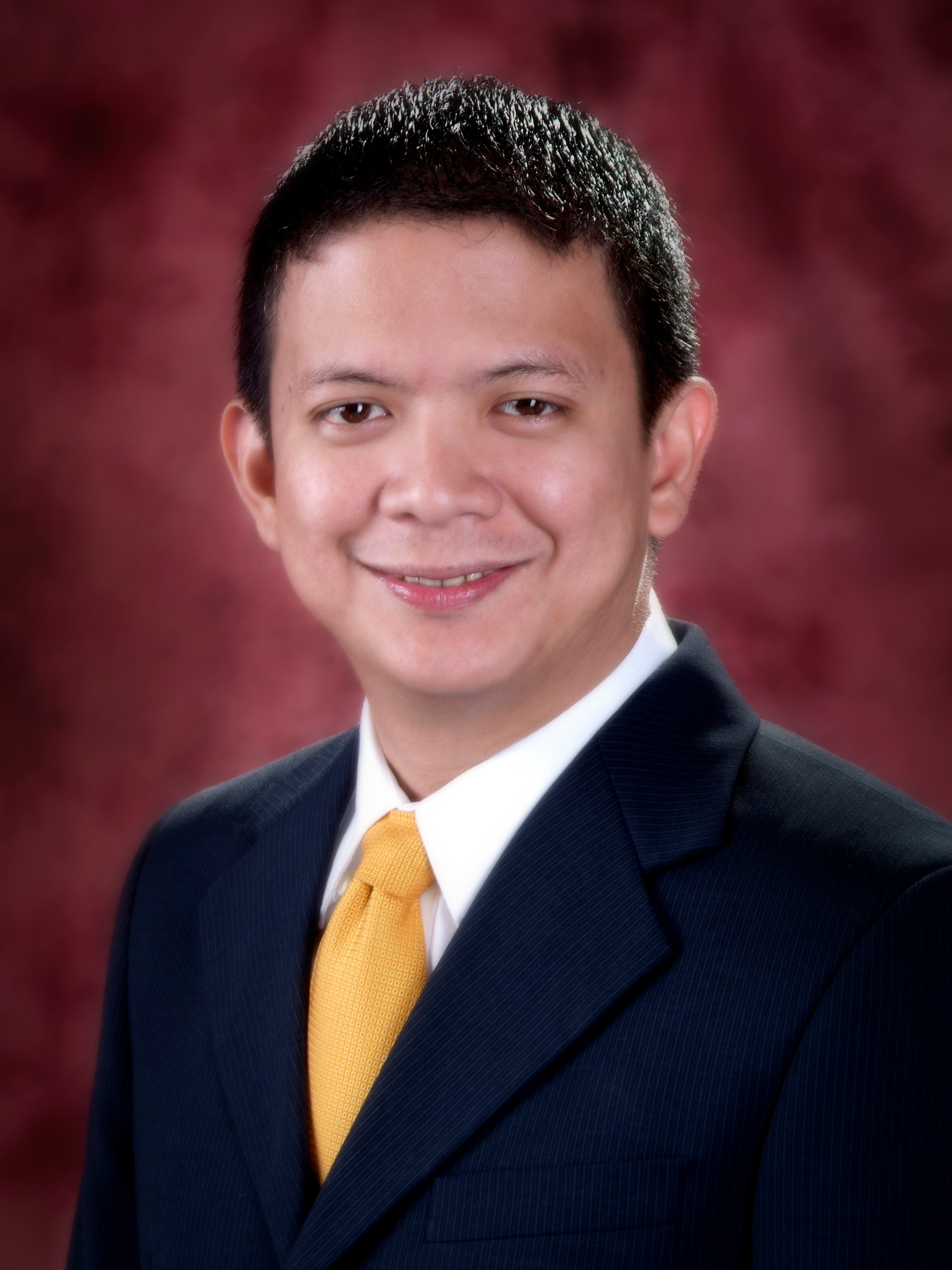 Congressman Francis "Chiz" Escudero